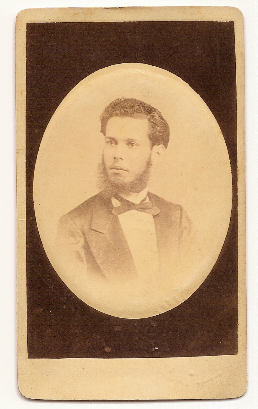 Joaquim Correia de Araújo, bacharel em 1864, Conde Correia de Araújo, professor da Faculdade de Direito do Recife, governador de Pernambuco, Senador Conselheiro do Império